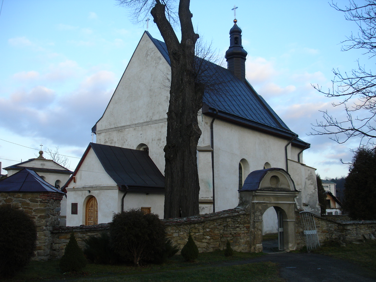 Zabytkowy łaciński kościół w Mrzygłodzie nad Sanem